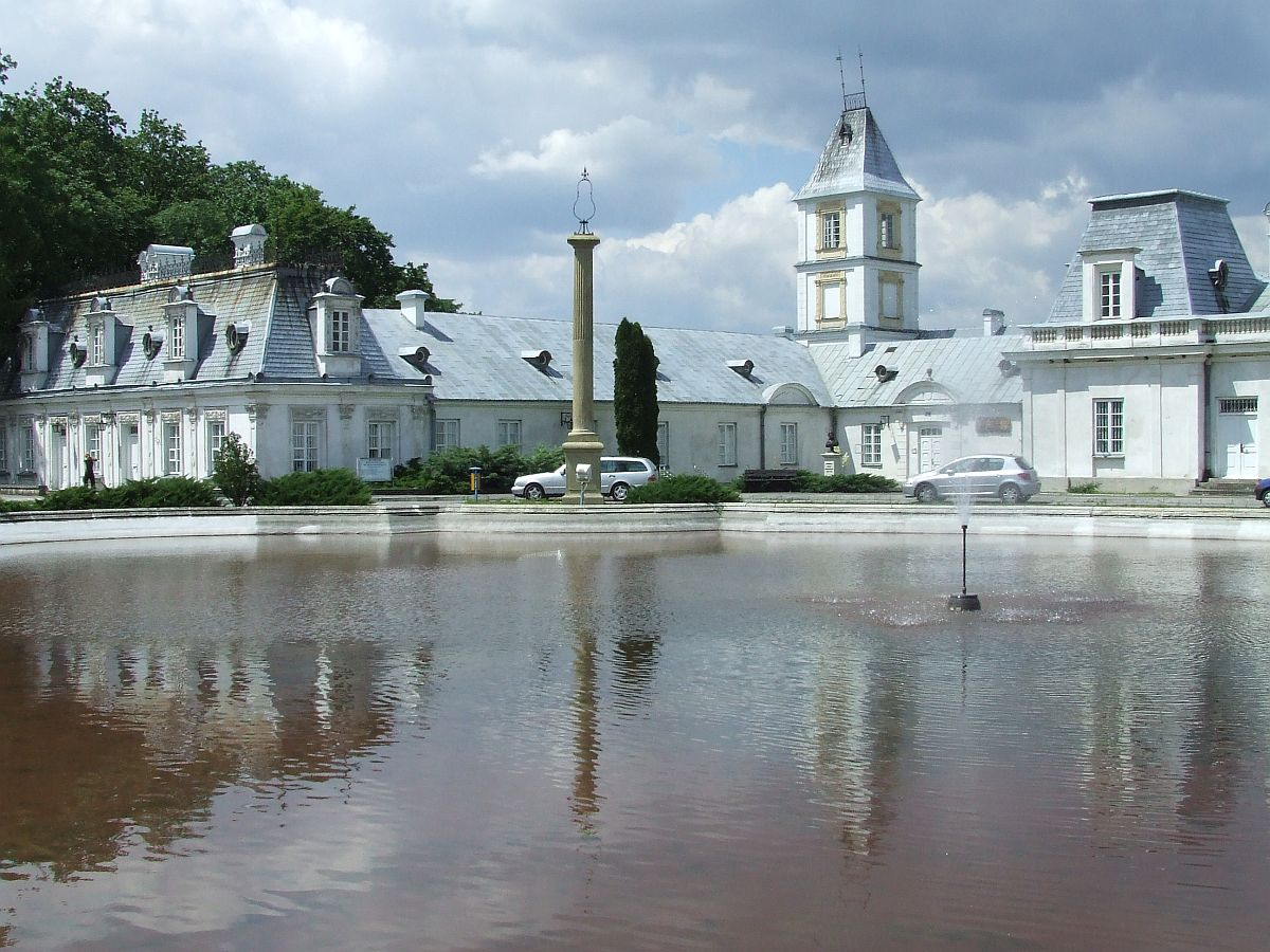 Pałac w Kozienicach